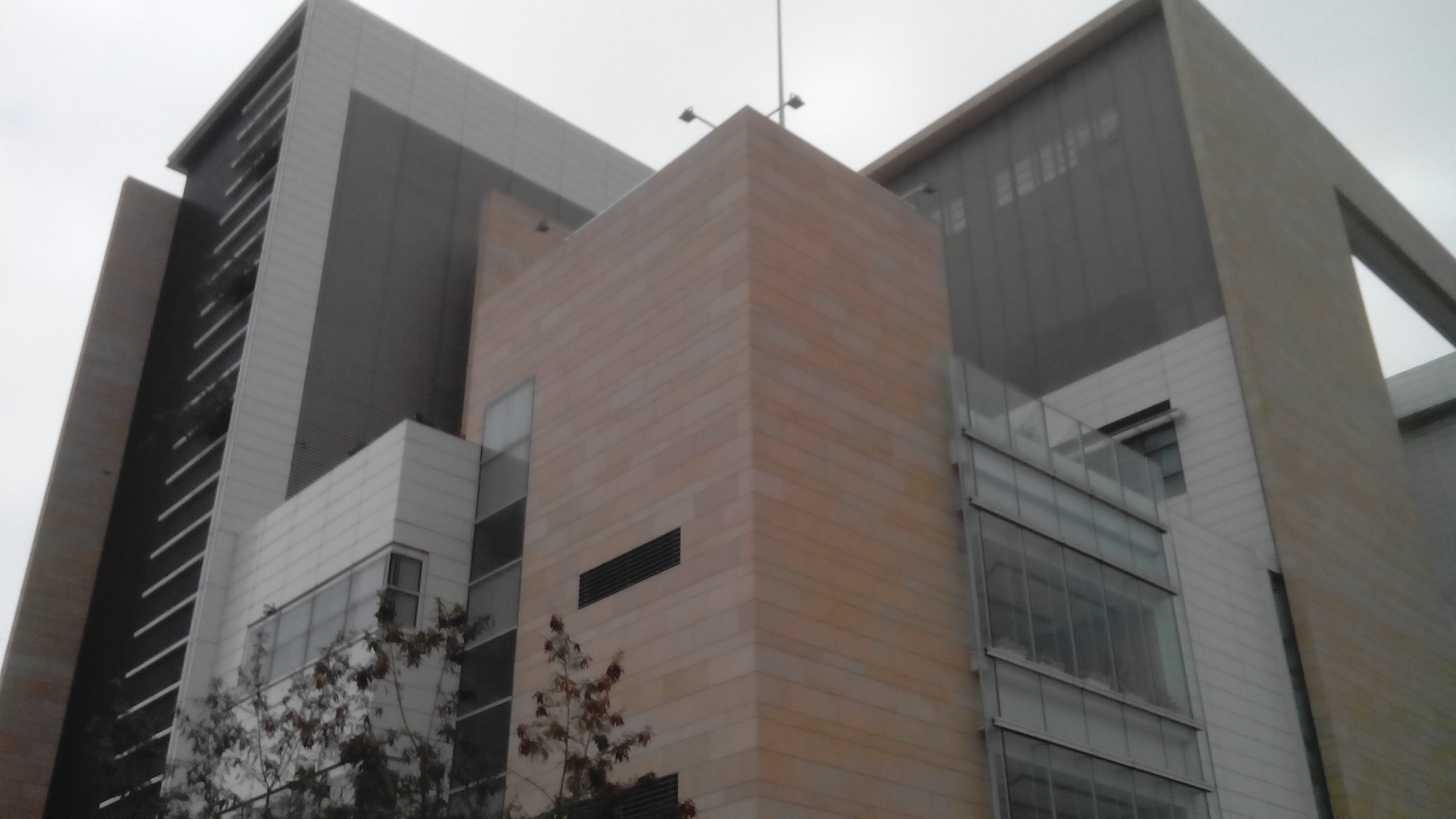 天水圍（天業路）社區健康中心